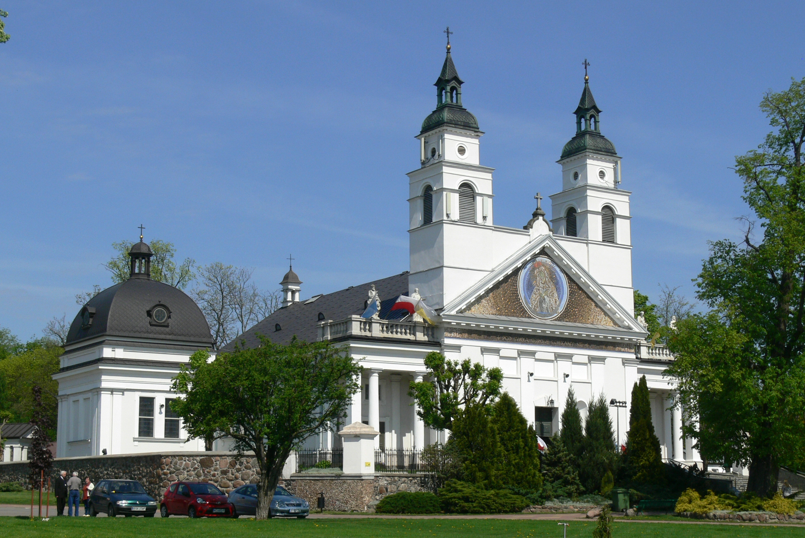 Sokółka, zespół kościoła par. p.w. św. Antoniego, 2 poł. XIX, XX